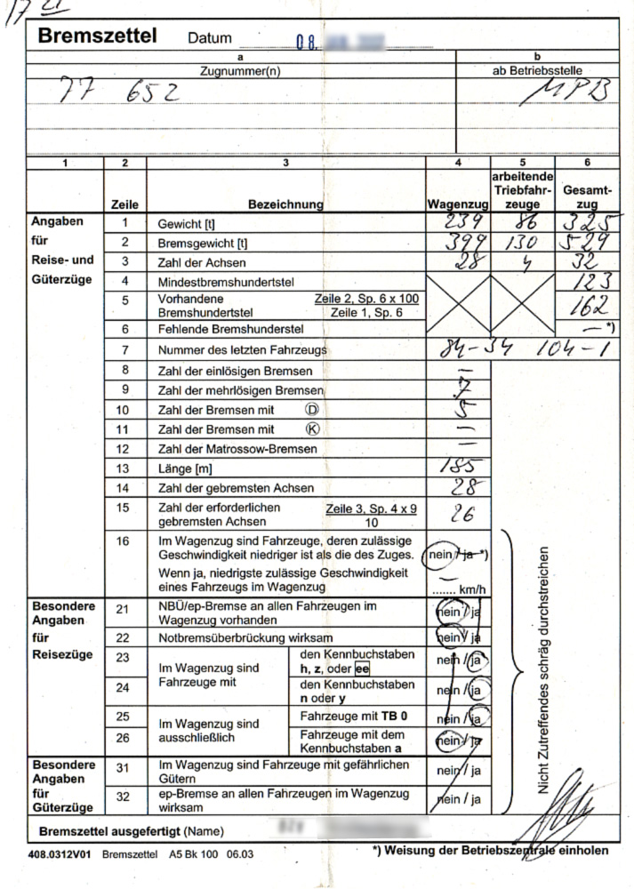 Ein Bremszettel der DB AG